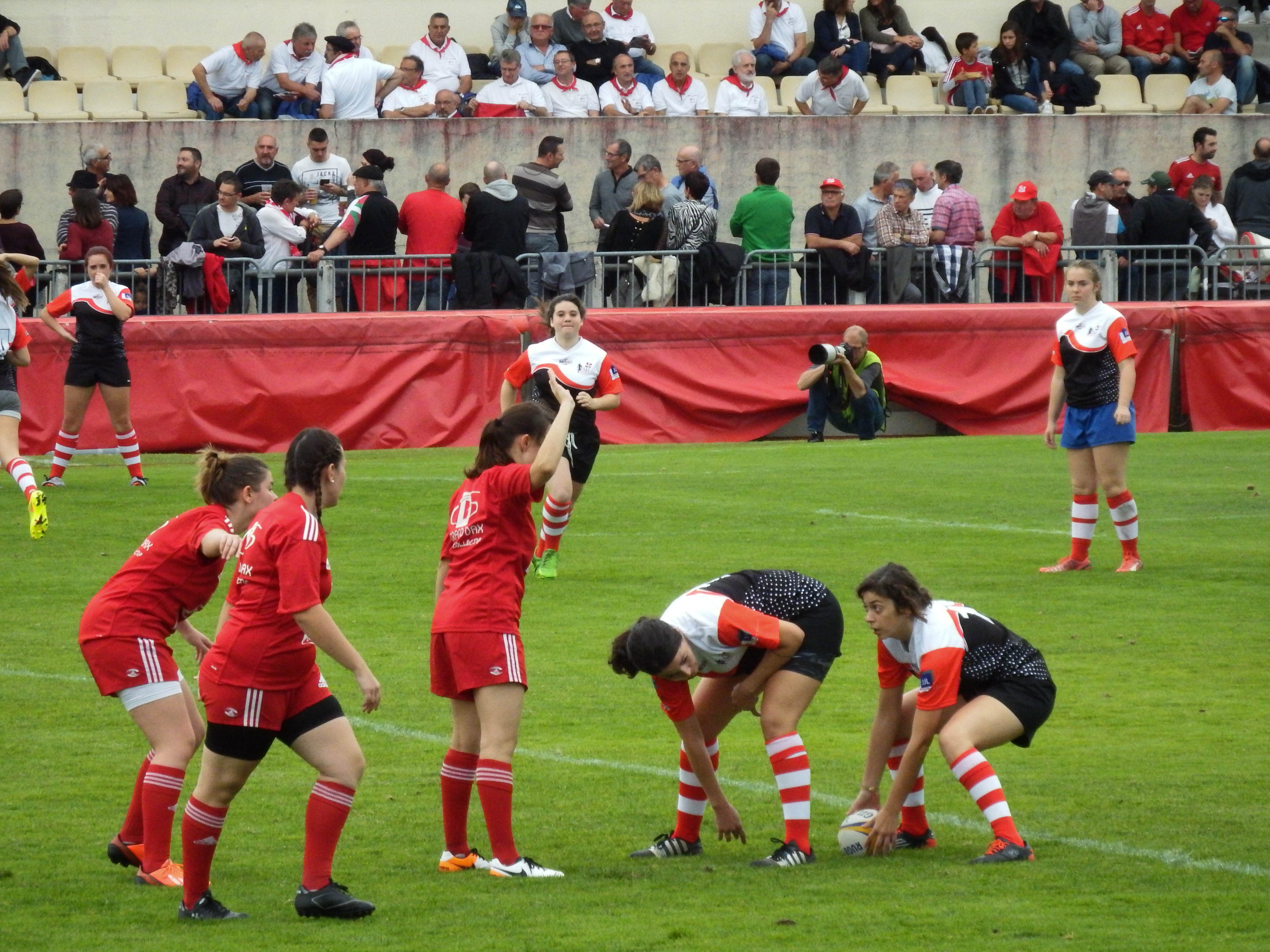 Rencontre amicale de rugby à 5. rugby union friendly match — 23 October 2016, Stade Maurice Boyau. Match between: US Dax — FAR Biarritz